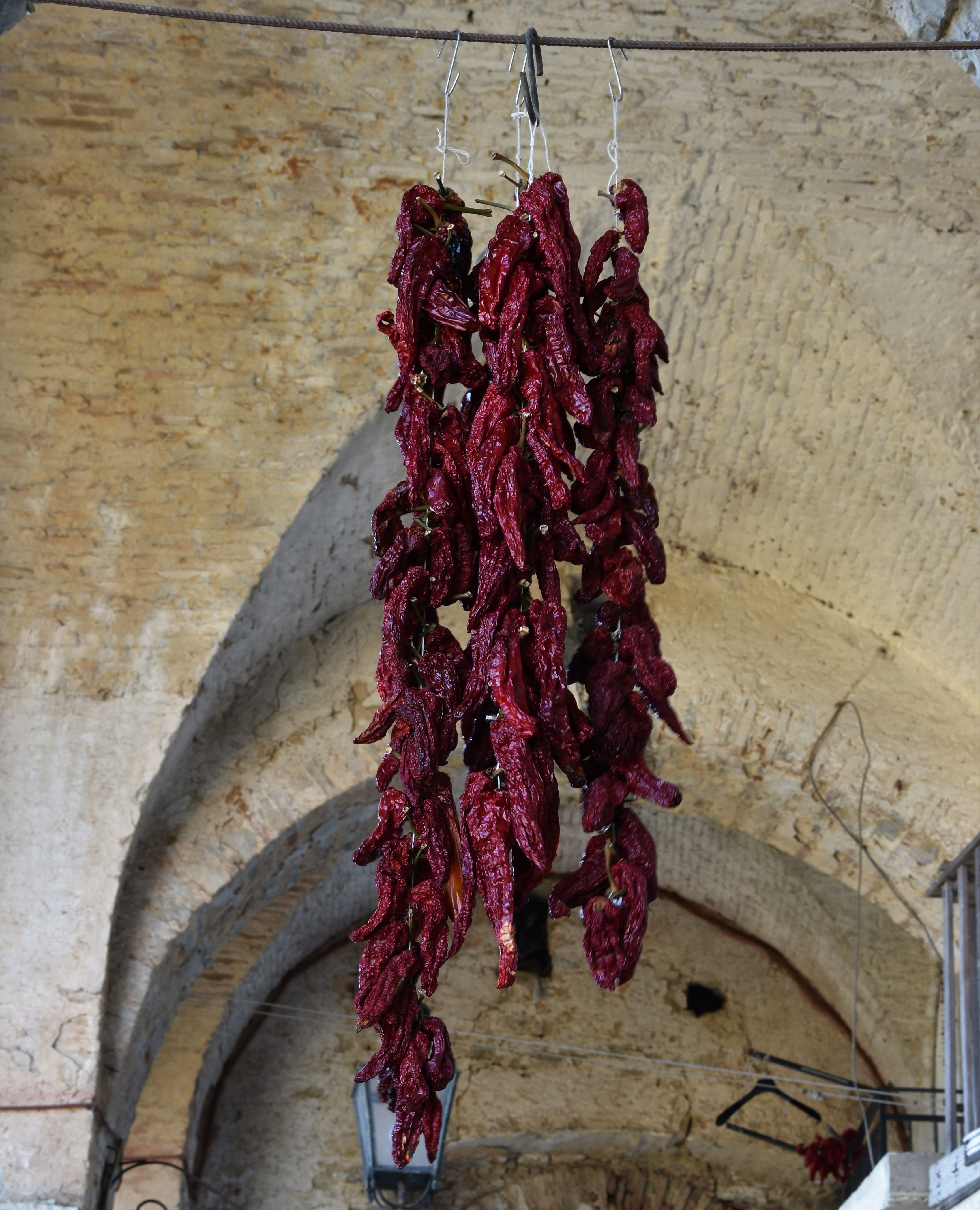 Lamie di Bitonte This is a photo of a monument which is part of cultural heritage of Italy.